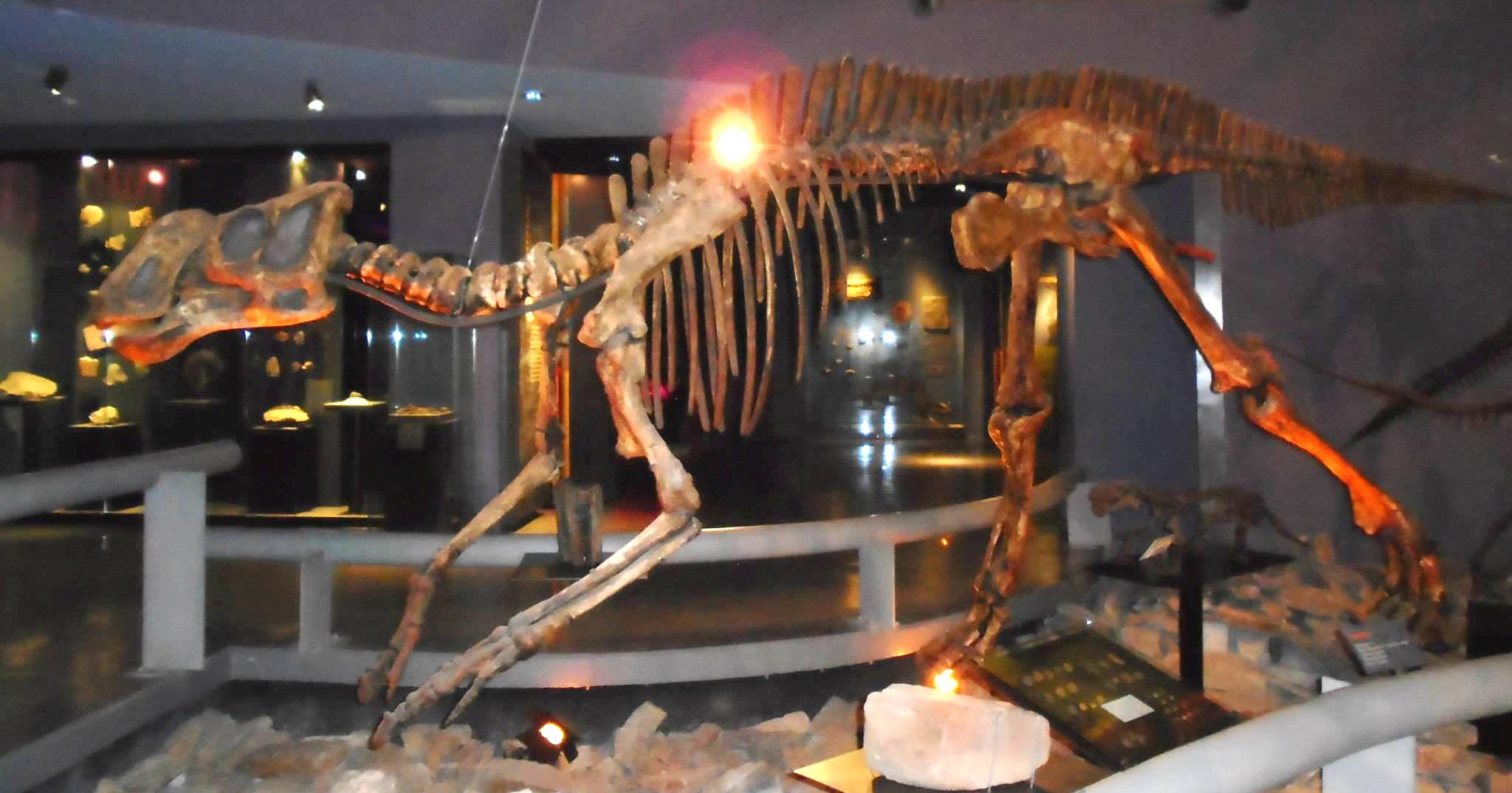 Reconstrucción de Latirhinus en el Pabellon 1 del Museo del Desierto en Saltillo, Coahuila.